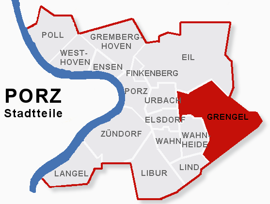 Lage des Stadtteils Grengel im Stadtbezik Porz